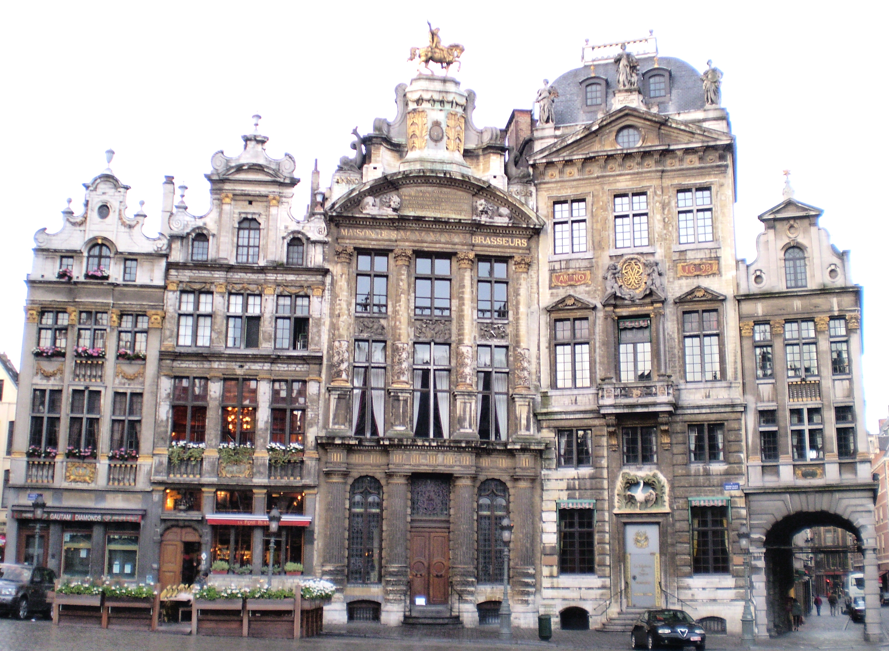 Maisons de la Grand-Place de Bruxelles, entre la rue des Chapeliers et la rue Charles Buls (sud): Le Mont Thabor, La Rose, L'Arbre d'Or, Le Cygne, L'Étoile.